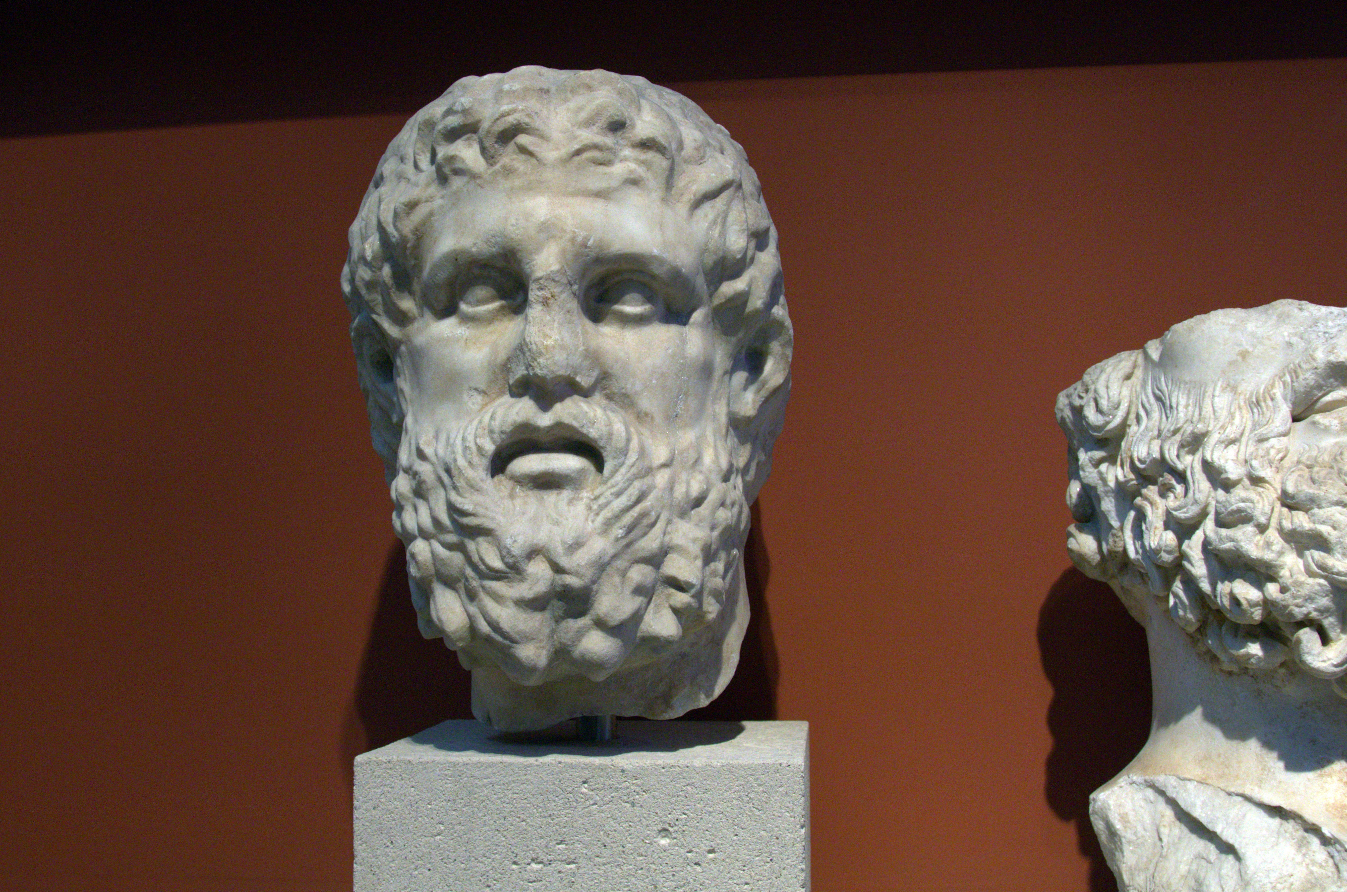 "It may have belonged to the cult statue of this god at his sanctuary at Morrylos. Ano Apostoloi, Kilkis (ancient Morrylos). Late 4th c. B.C. Archaeological Museum of Thessaloniki, Greece. --- Κεφάλι Ασκληπιού. Ίσως ανήκει στο λατρευτικό άγαλμα του θεού από το ιερό του στη Μόρρυλο. Άνω Απόστολοι Κιλκίς (αρχαία Μόρρυλος). Τέλη 4ου αι. π.Χ. Αρχαιολογικό Μουσείο Θεσσαλονίκης.